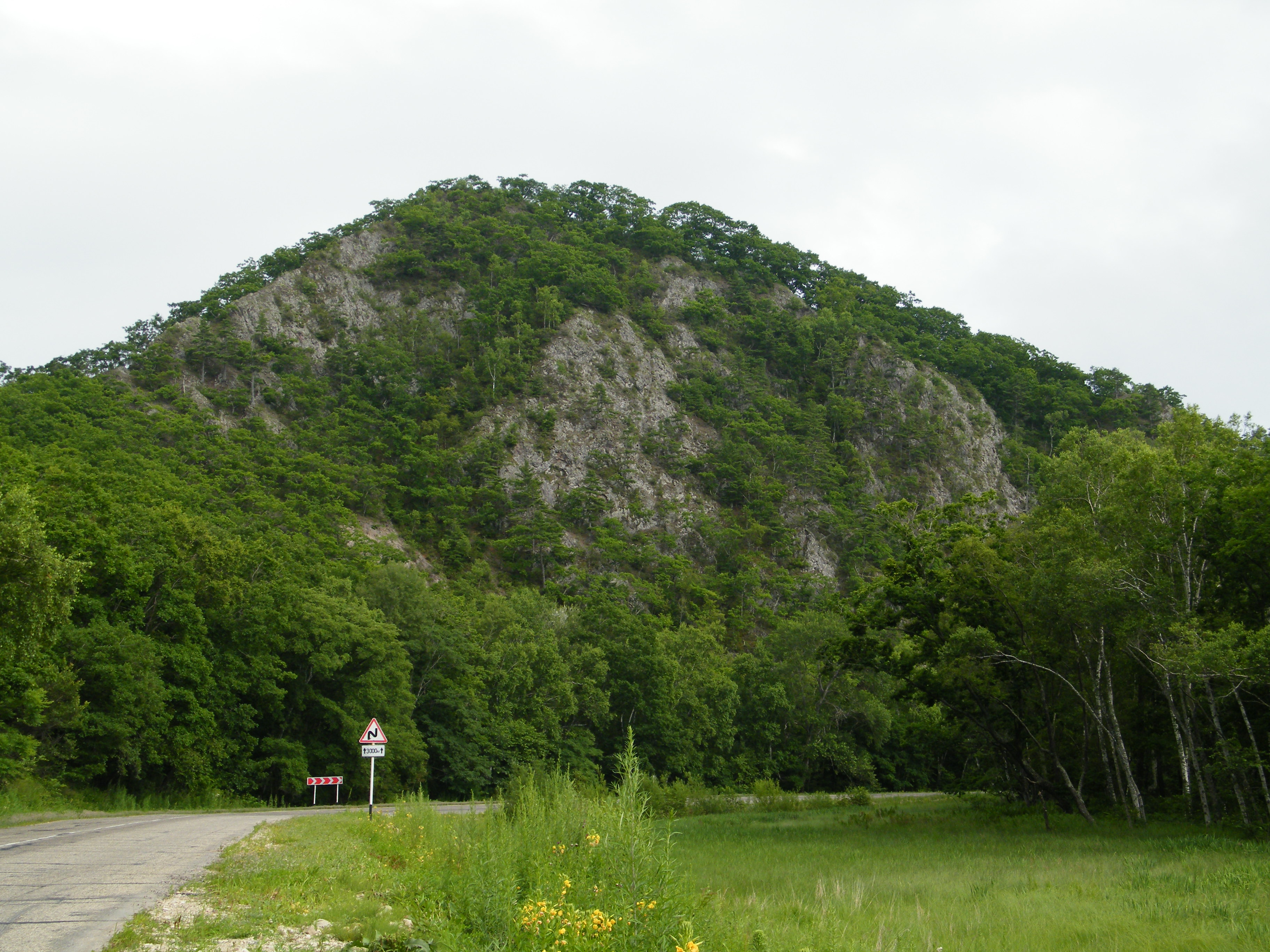 Ольгинский район, чёртов утёс